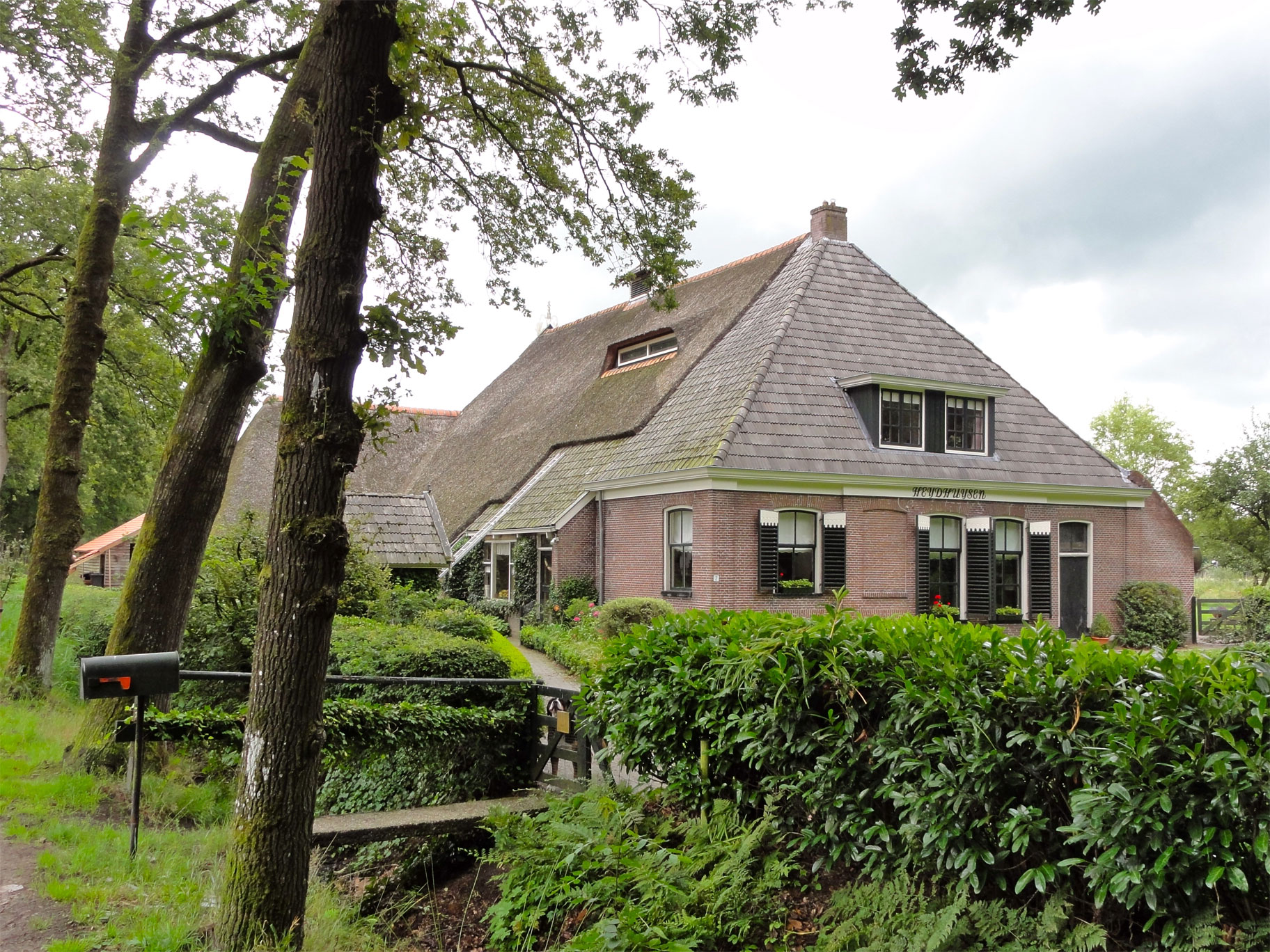 Boerderij in Heidehuizen in de gemeente Opsterland